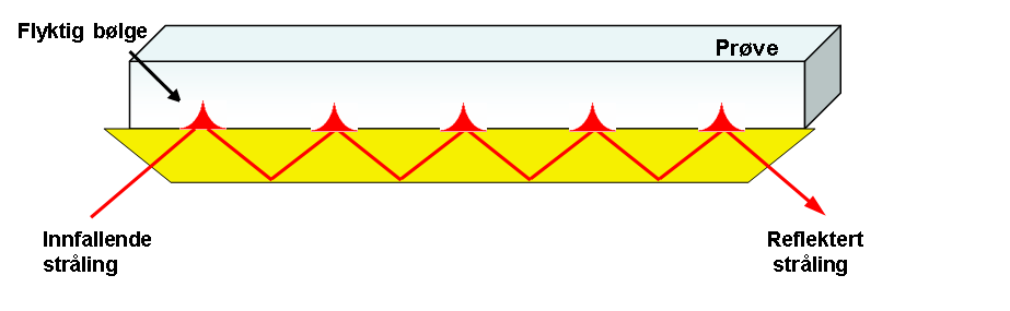 prinsipp for dempet totalreflesksjon i infrarød spektroskopi